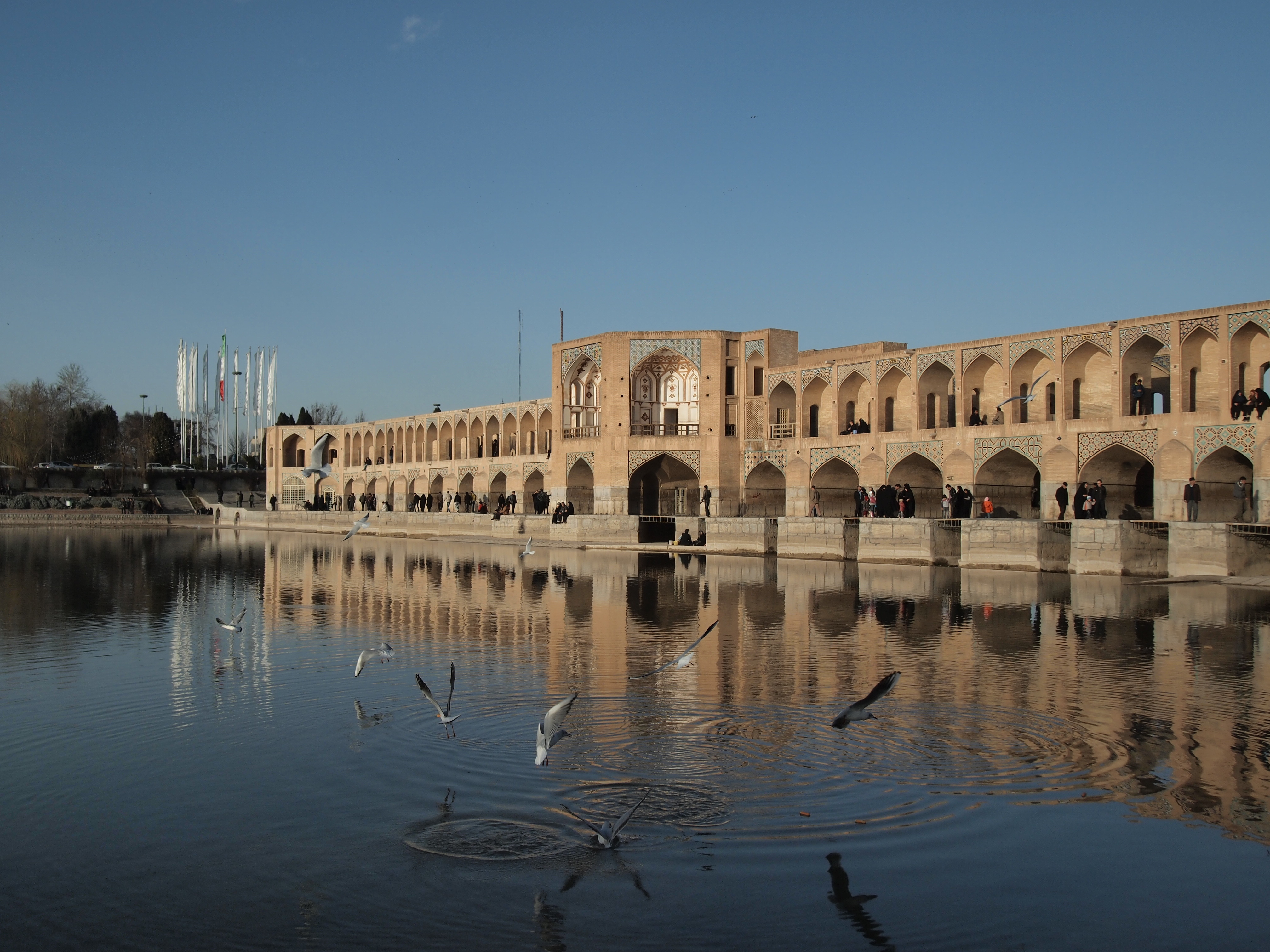 Khaju Bridge